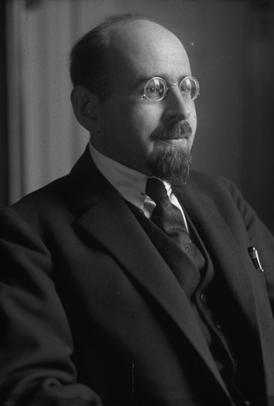 Der neue Doyen des Diplomatischen Corps in Berlin! Der russische Botschafter in Berlin, Krestinski ist zum Doyen des Diplomatischen Corps nach der Abberufung Nuntius Pacelli ernannt worden.